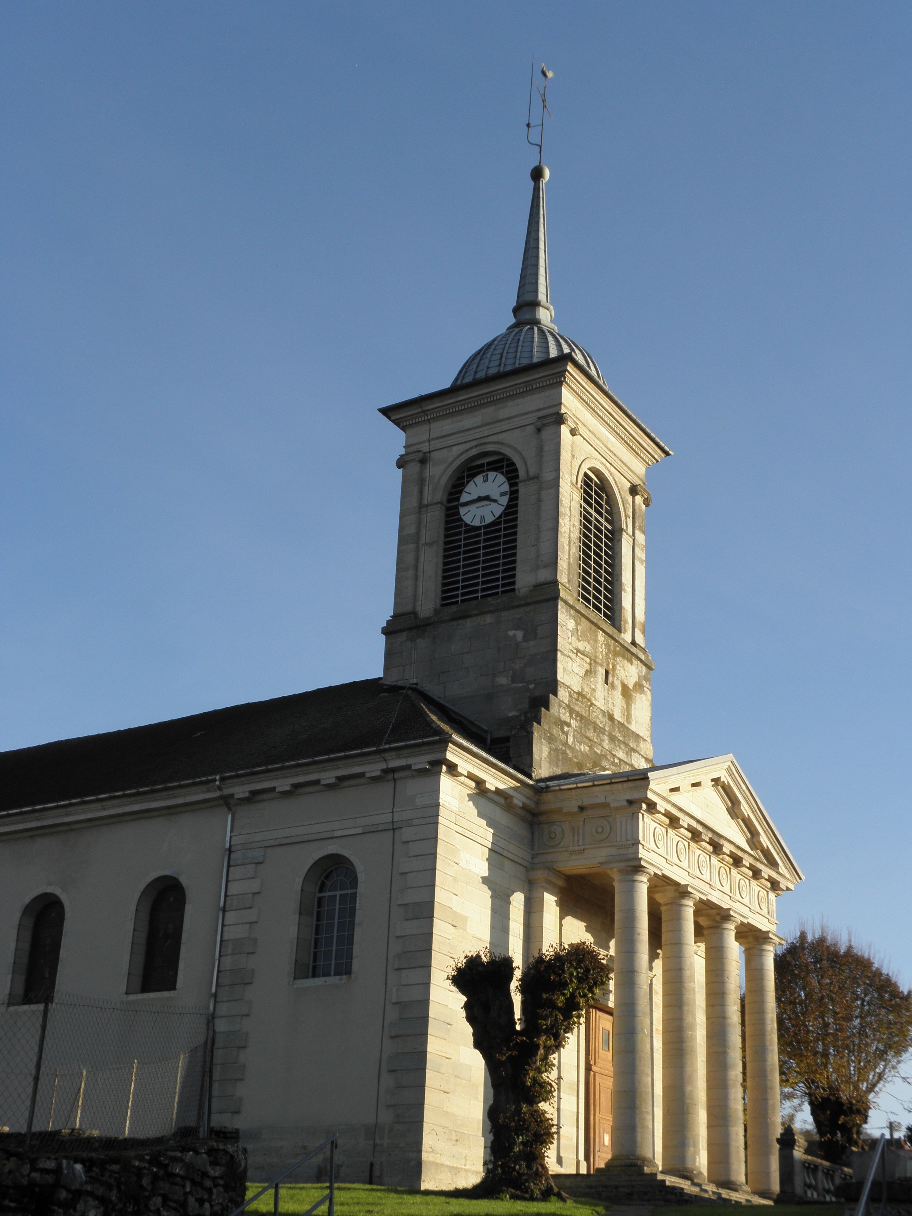 VALAY l'église